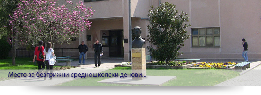 АСУЦ "Боро Петрушевски"-Скопје